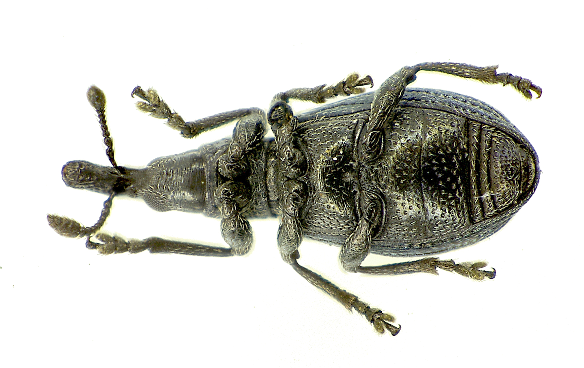 Perapion violaceum aus Frankreich bei Muhlouse am15. April 2013 Unterseite